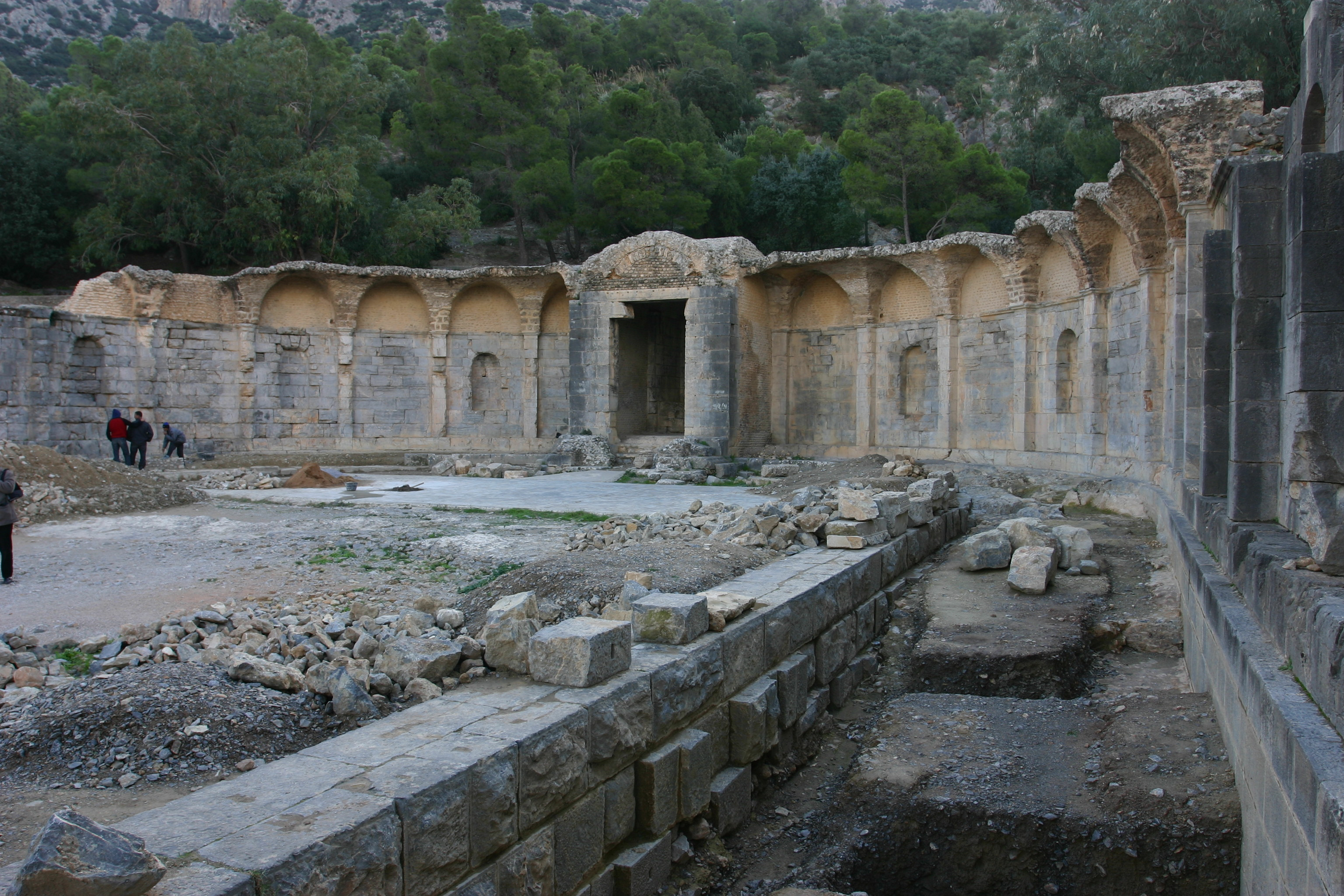 Photo personnelle prise en déc 2004 ; représentant le temple de l'eau adossé au djebel Zaghouan.